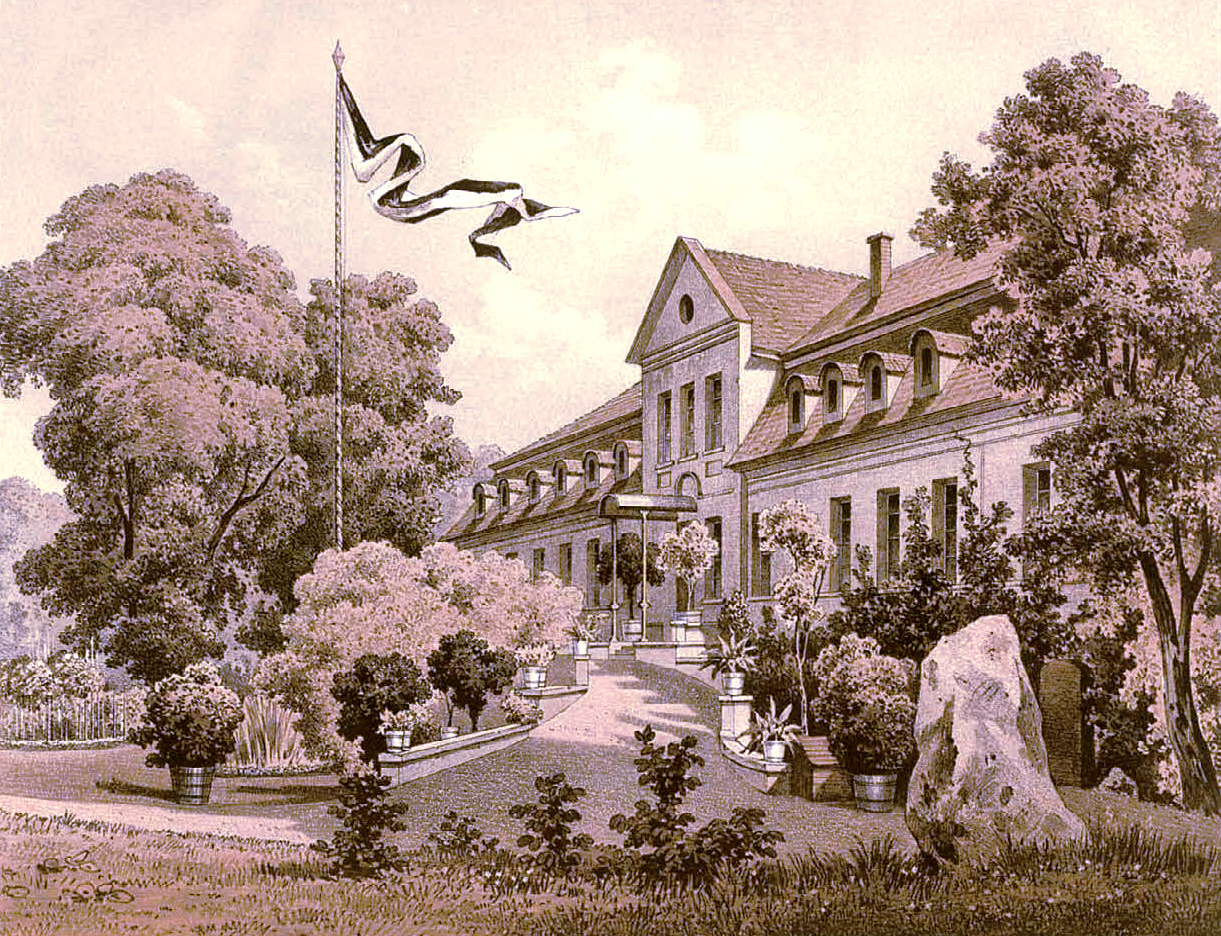 Schloss Krischow, Kreis Cottbus, Provinz Brandenburg